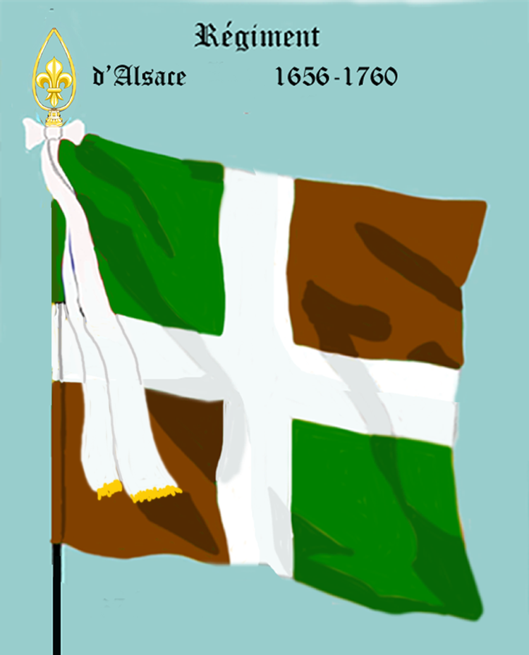 Ordonnanzfahne eines königlich französischen Infanterie-Regiments. (Fremdenregiment aus Deutschland)- Entnommen und überarbeitet aus: „LES UNIFORMES ET LES DRAPEAUX DE L'ARMÉE DU ROI“ Marseille 1899. (Drapeau d'Ordonnance d'un régiment française d'infanterie royale. (Régiment étrangère allemande.)